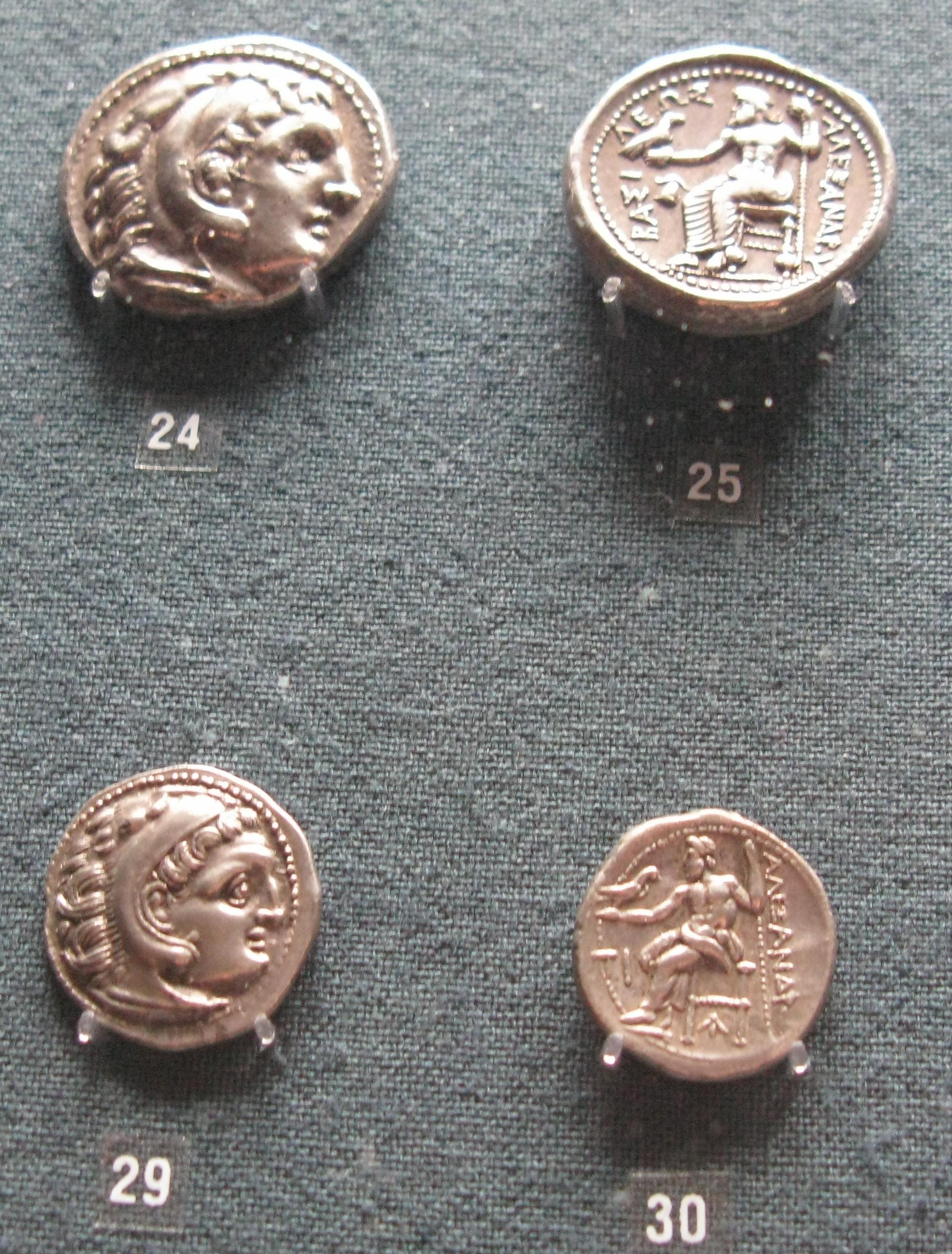 Mints of Alexander the Great: 24-25. Tetradrachms 29-30. Drachms Numismatic Museum of Athens, Greece. Η νομισματοκοπία του Μεγάλου Αλεξάνδρου: 24-25. Τετράδραχμα 29-30. Δραχμαί Νομισματικό Μουσείο, Αθήνα.